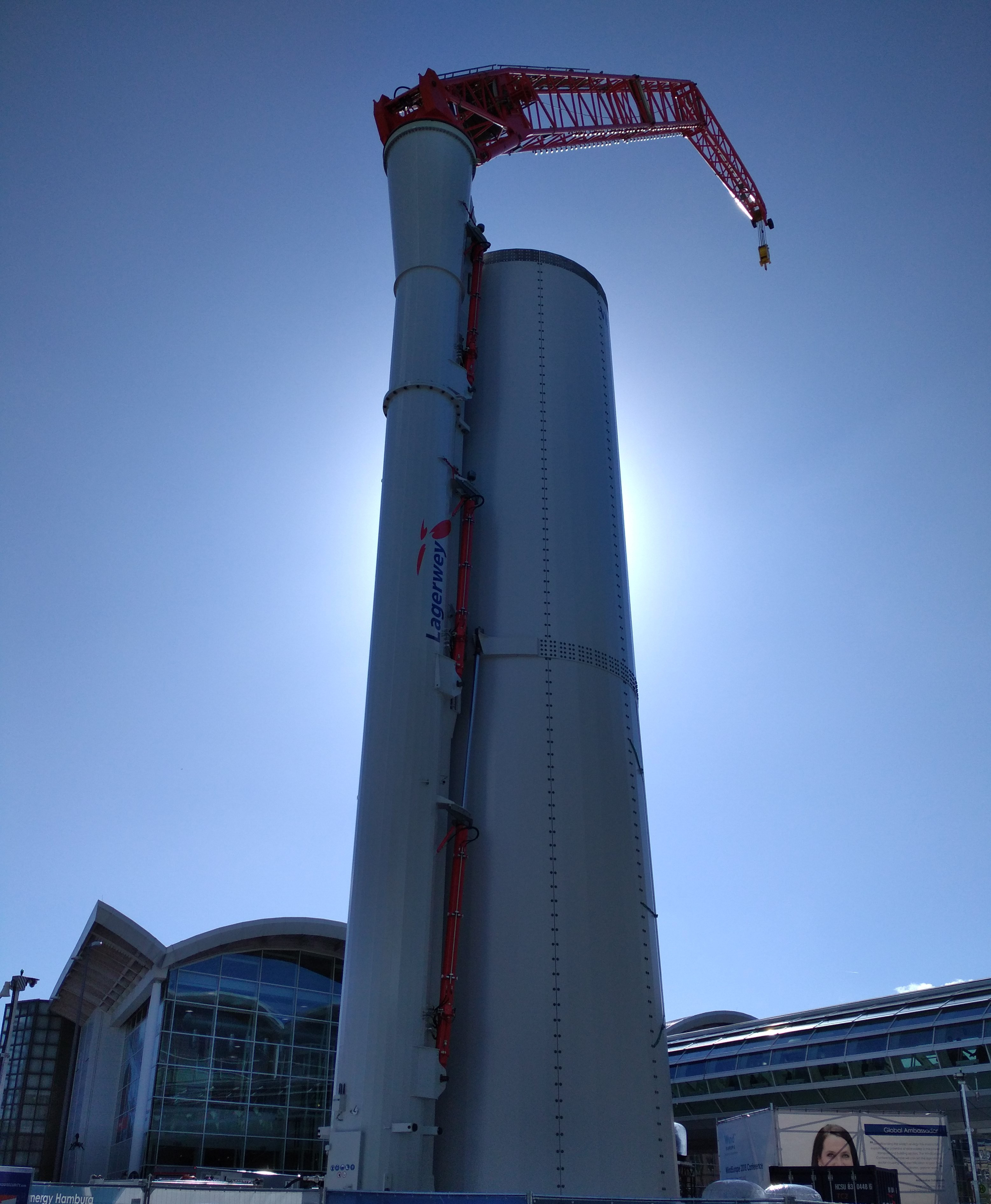 Exponat eines Lagerwey Kletterkrans WindEnergy Hamburg 2018